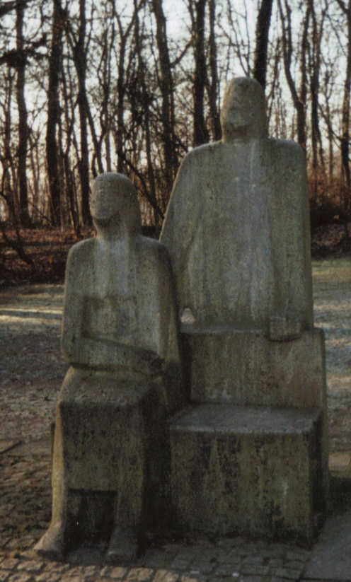 Mahnmal im Bergholz, Hildesheim.